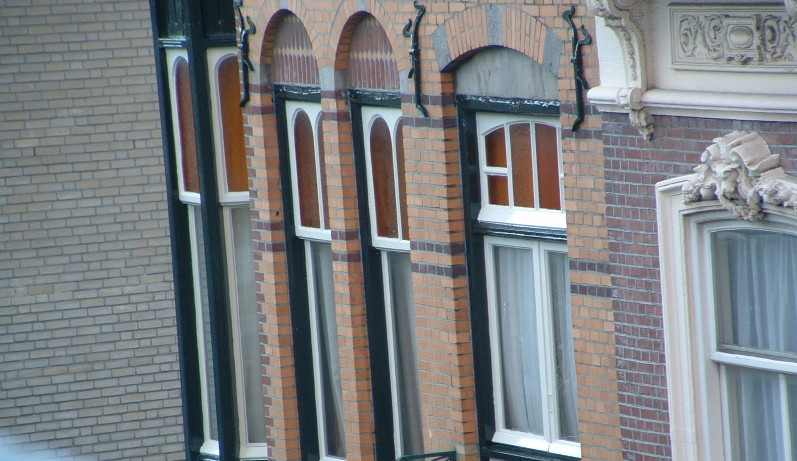 Detail Jugendstilpand aan Witte de Withstraat Den Haag